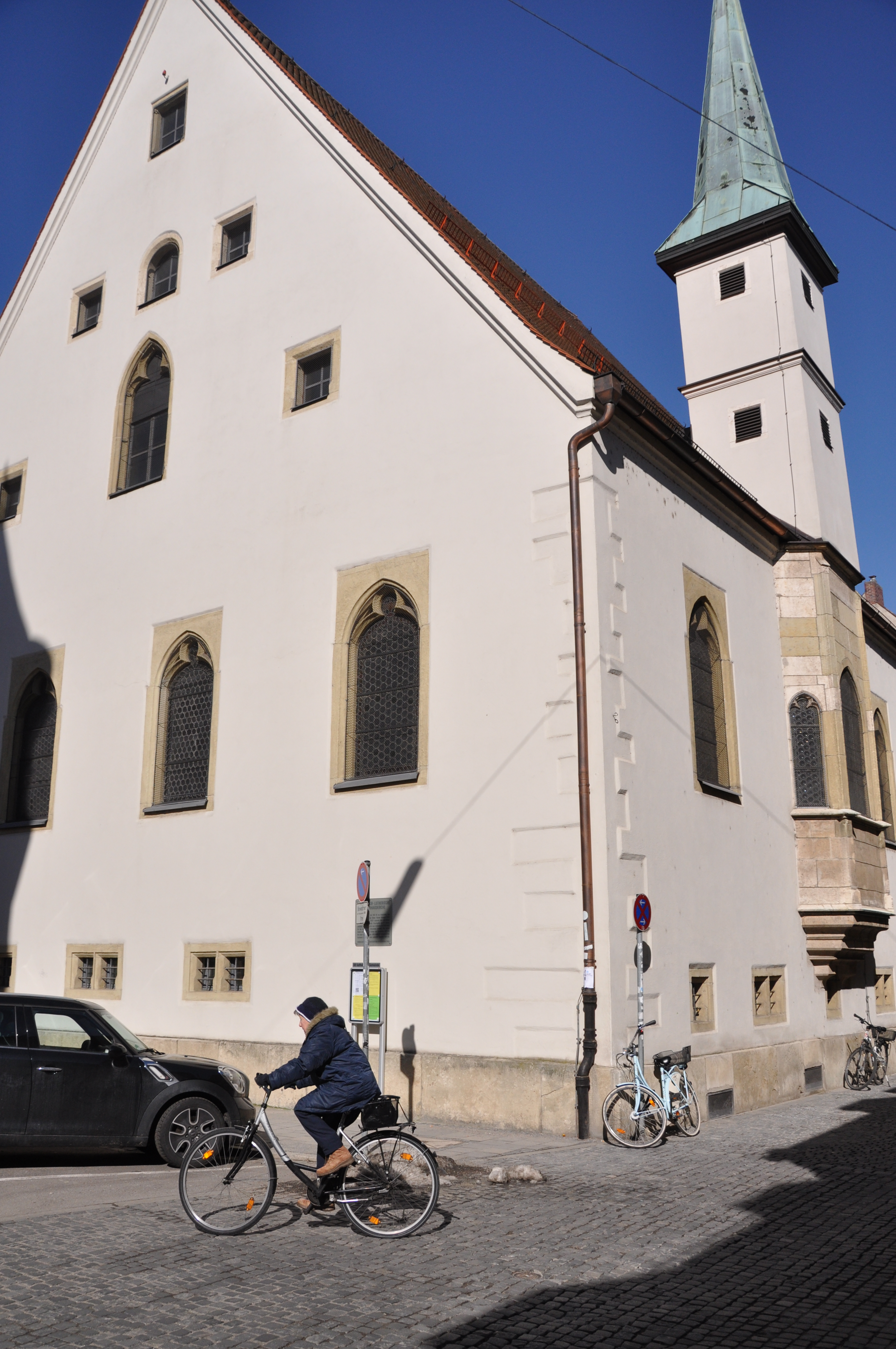 Bruderhauskirche Aussenfassade mit Erker und Turm